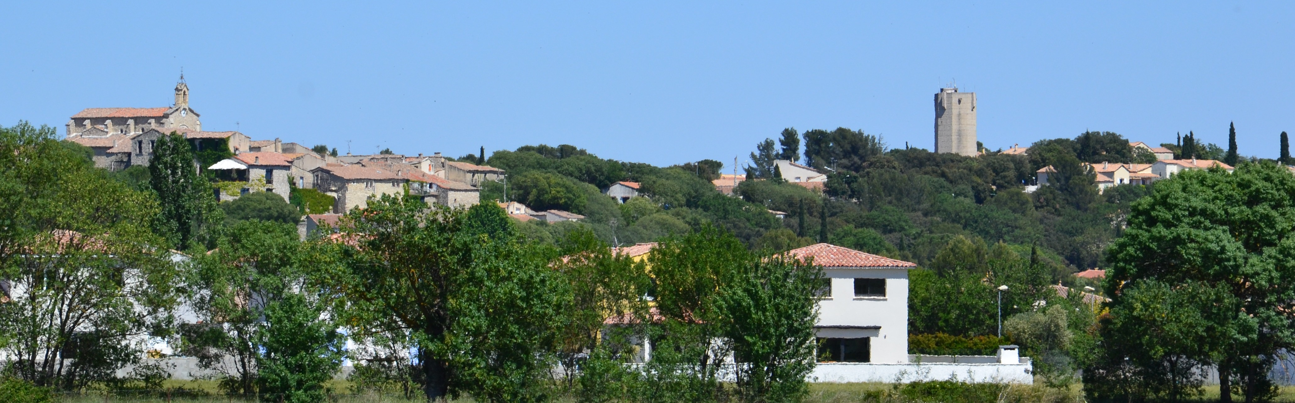 Vue sur la colline de Teyran.